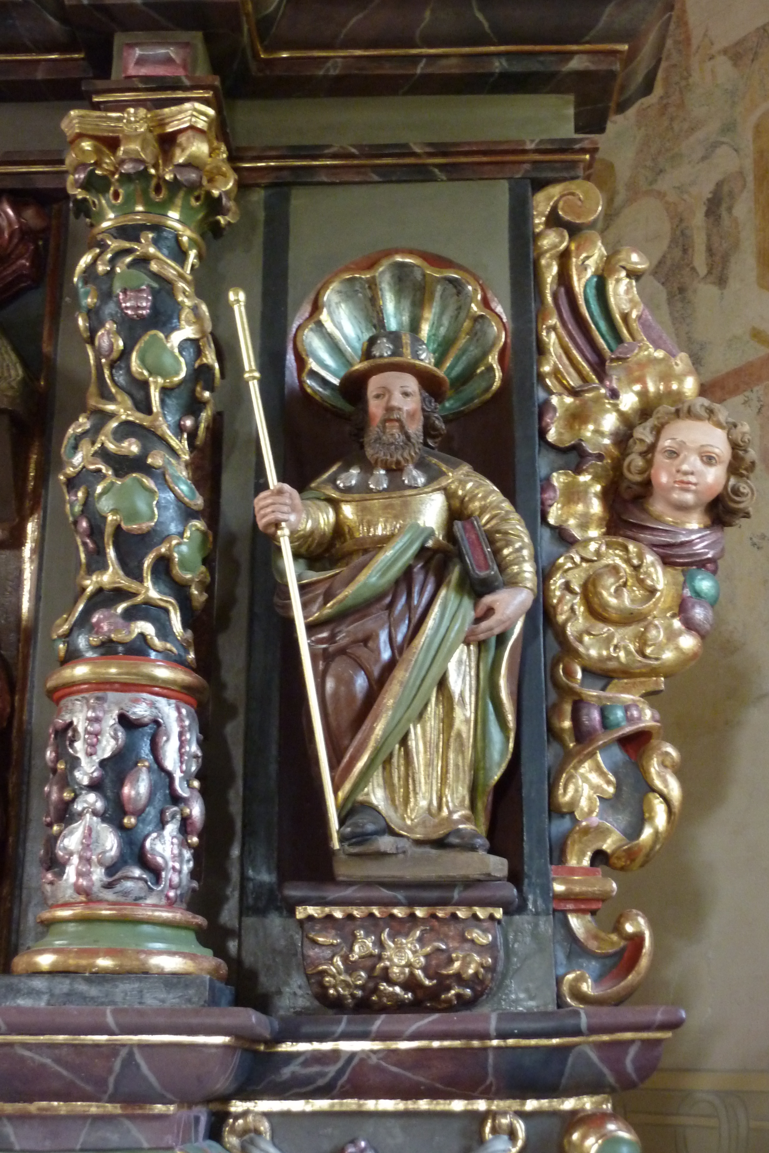 Wallfahrtskapelle St. Jost in Langenfeld, Altar mit hl. Jost ?